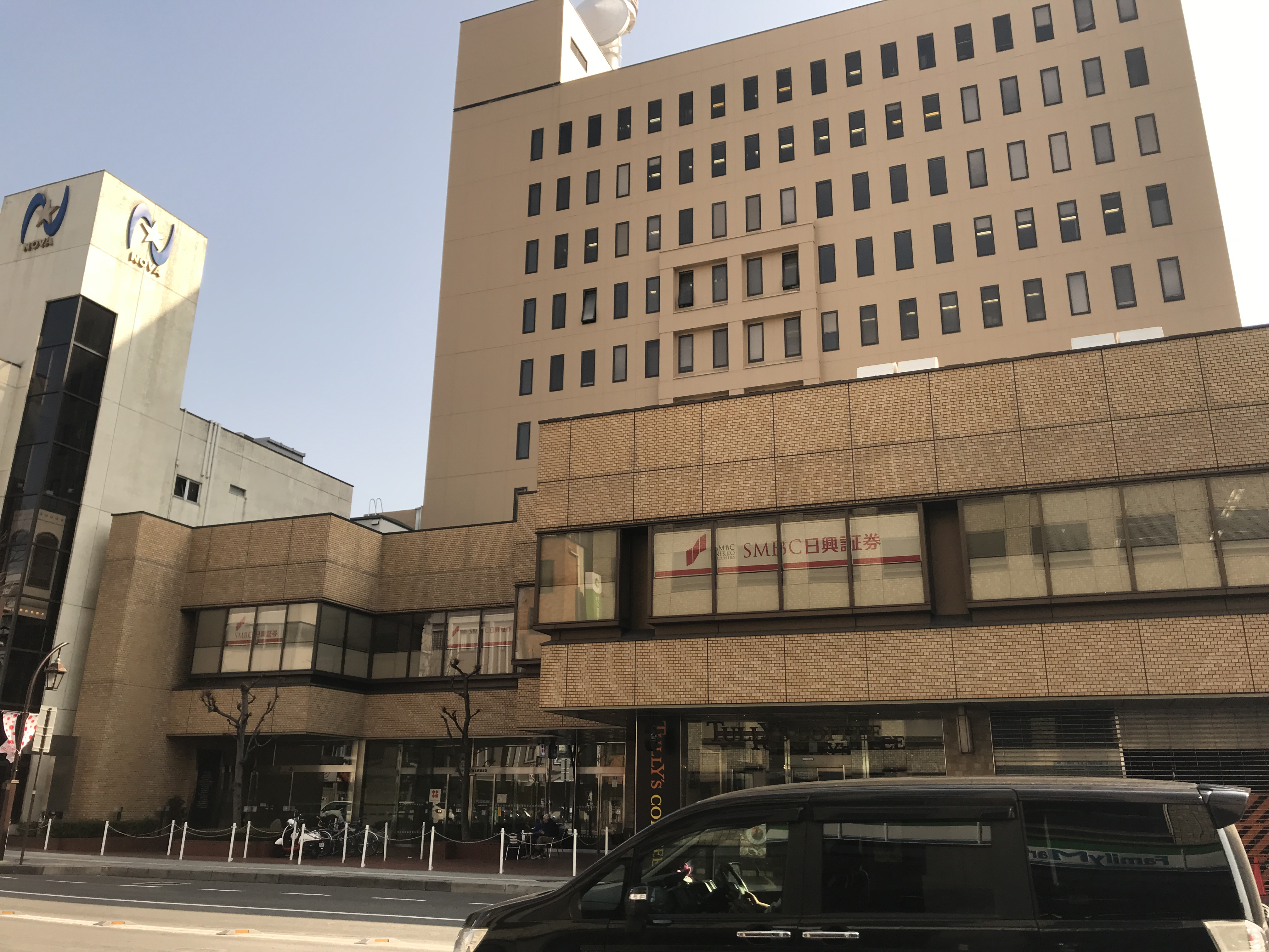 昭和ビル松本。 SMBC日興証券や、長野放送松本放送局、タリーズコーヒー、八十二銀行松本駅前支店などが、入居する。